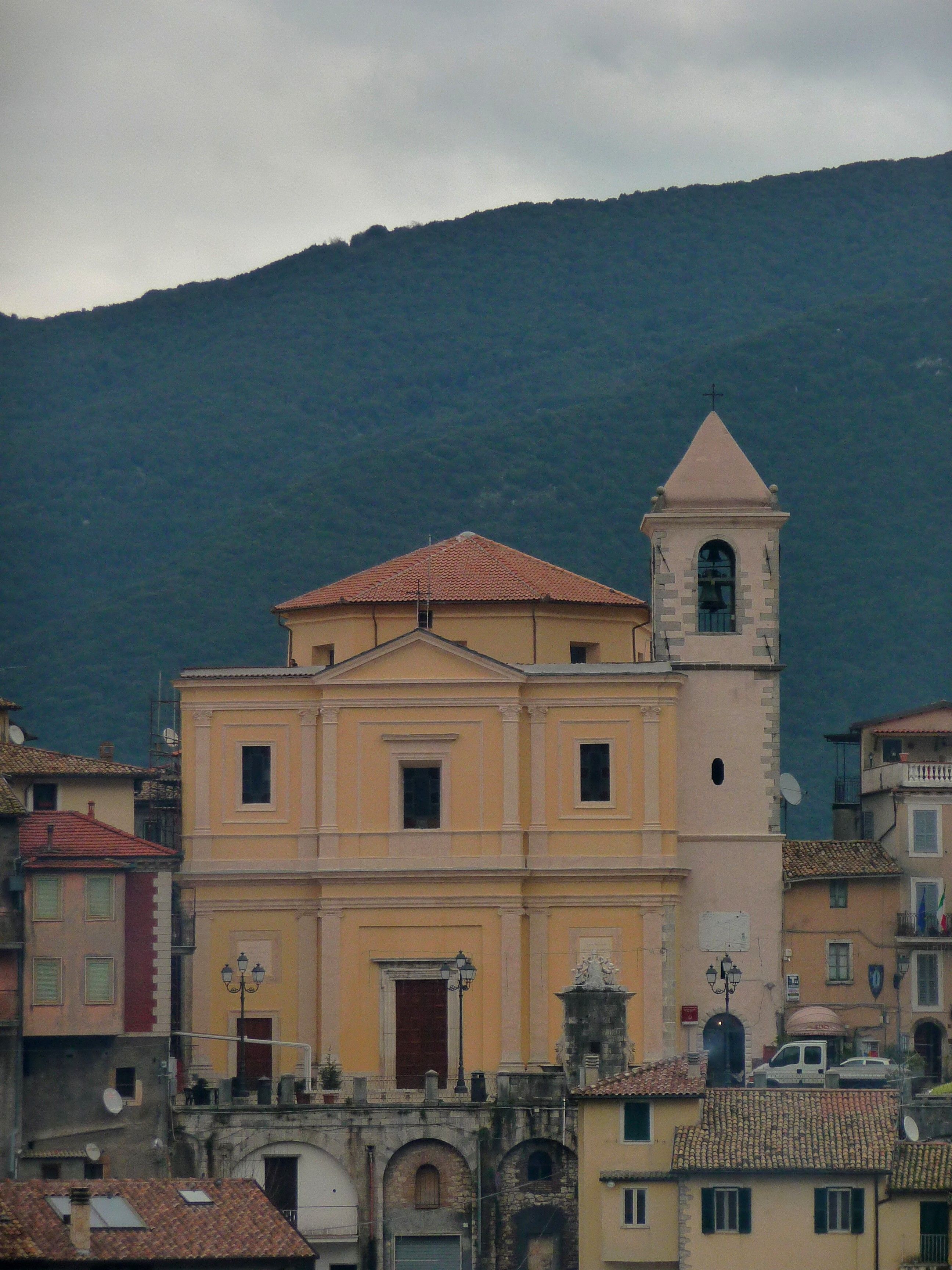 Collegio